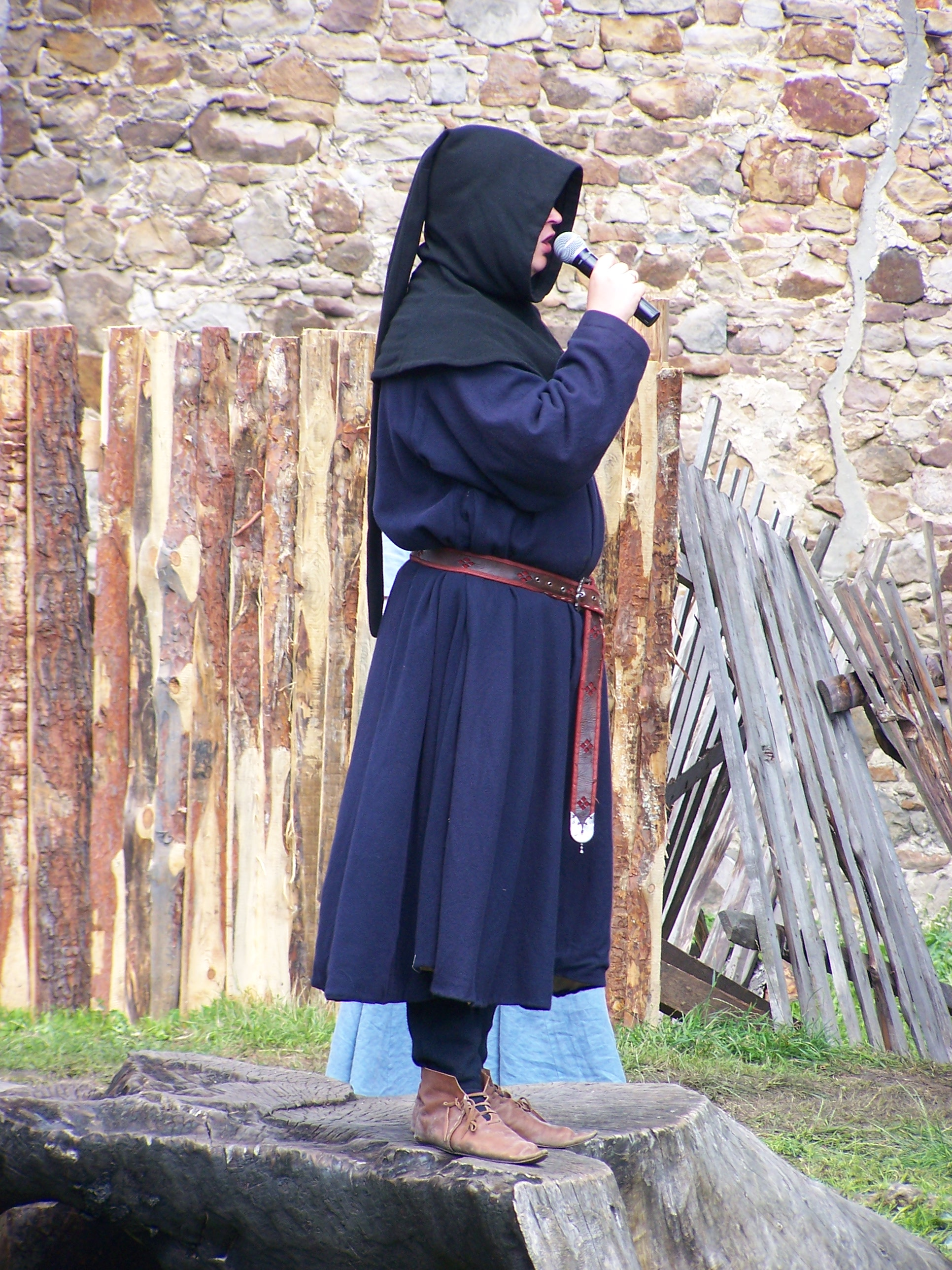 Narrator. Rekonstrukcja średniowiecznej bitwy z wojskami husyckimi podczas VII Jarmarku Średniowiecznego na zamku w Chudowie.